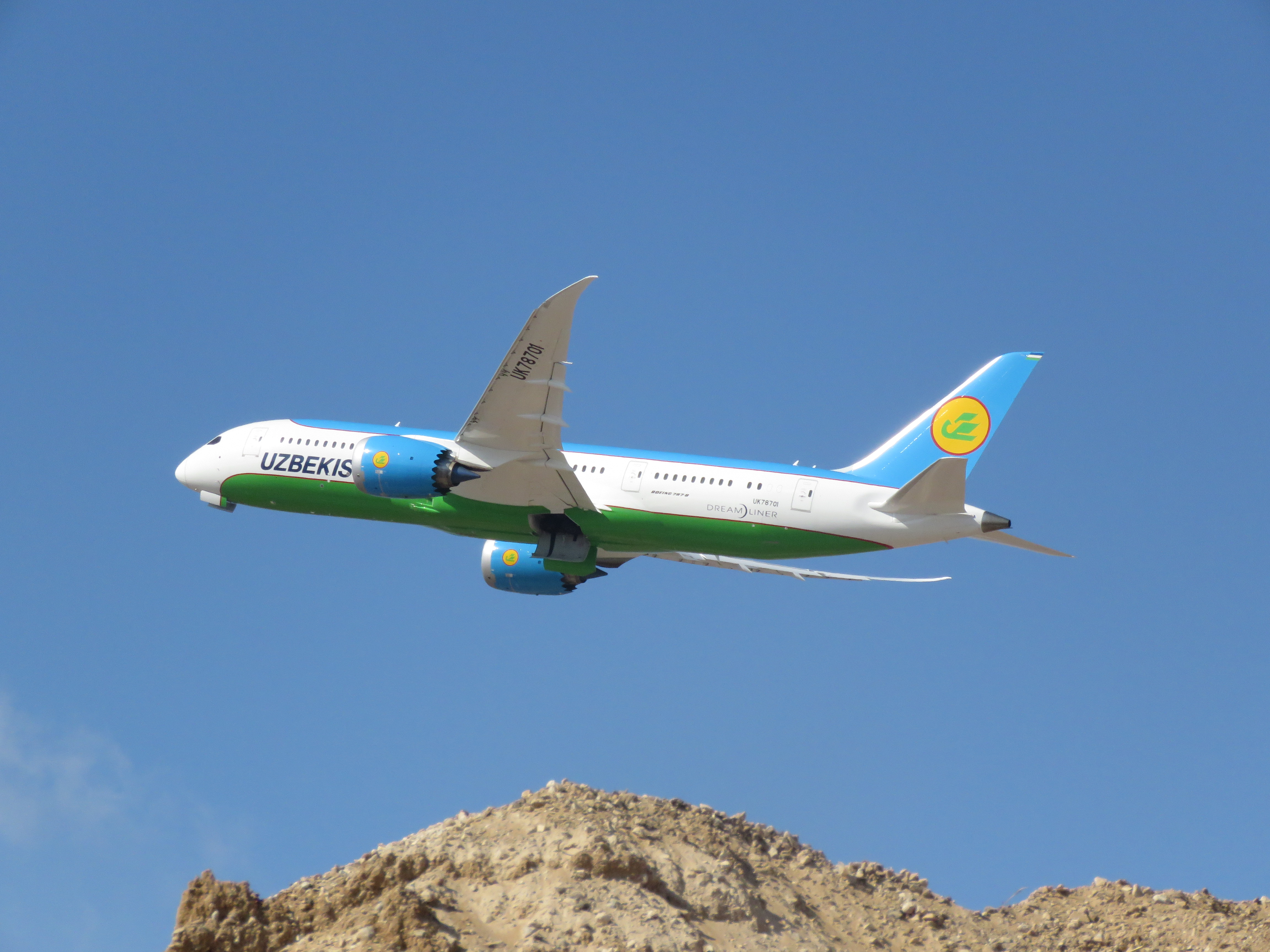 בואינג 787 של החברה ממריא מבן גוריון.